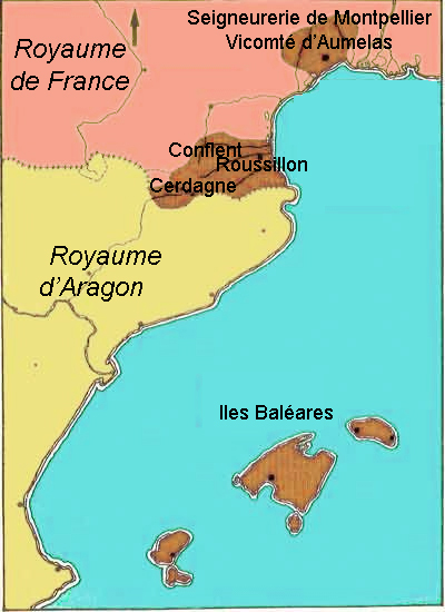 Carte du Royaume de Majorque (s. XIII-XIV)